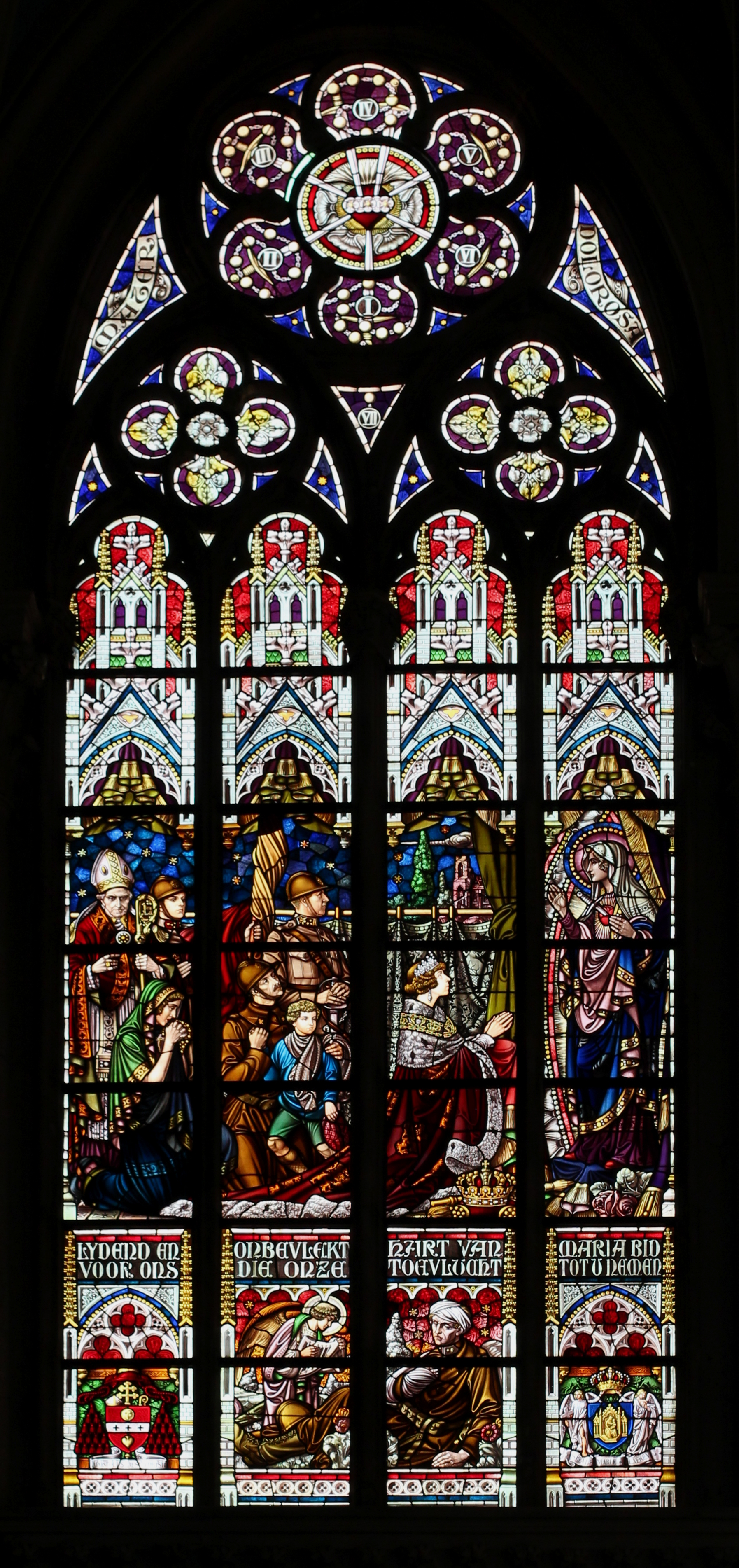 Vitrail de l'église Notre-Dame de Laeken, Bruxelles (Belgique).